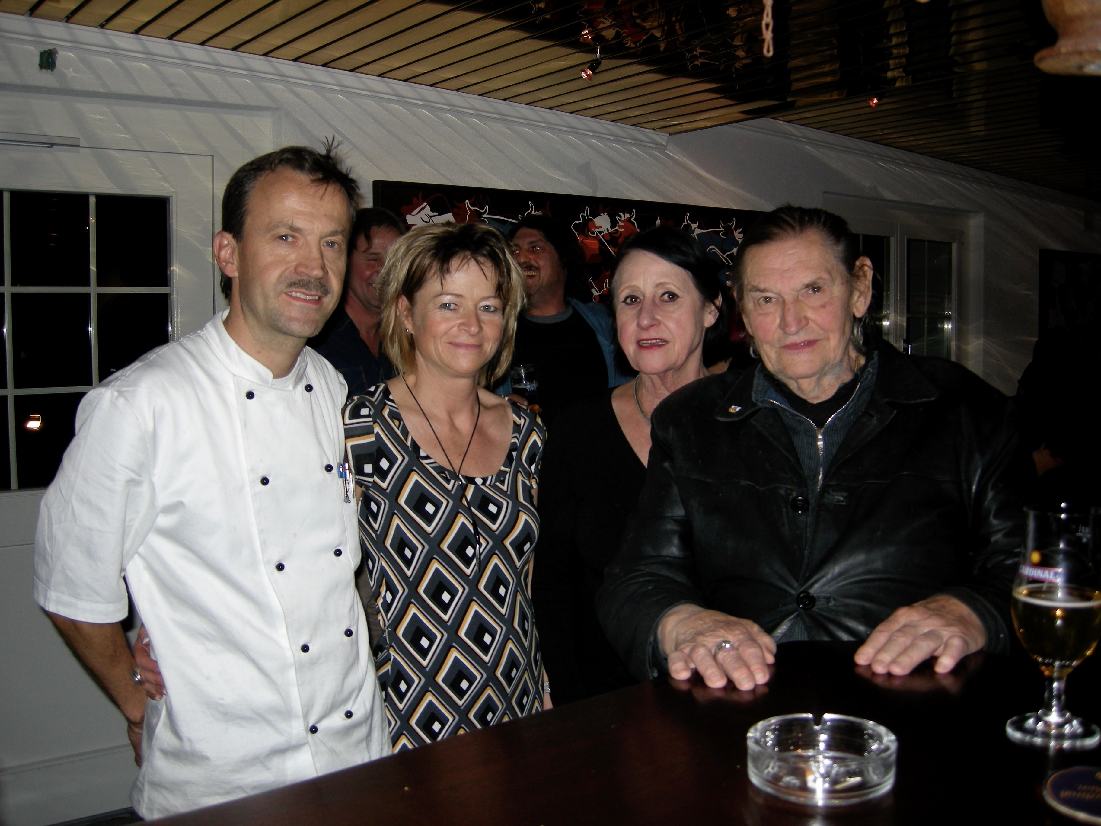 Gruppenfoto der Künstlerfamilie Luginbühl und Hans-Ueli Leisi anlässlich der Eröffnung der bar des Artists